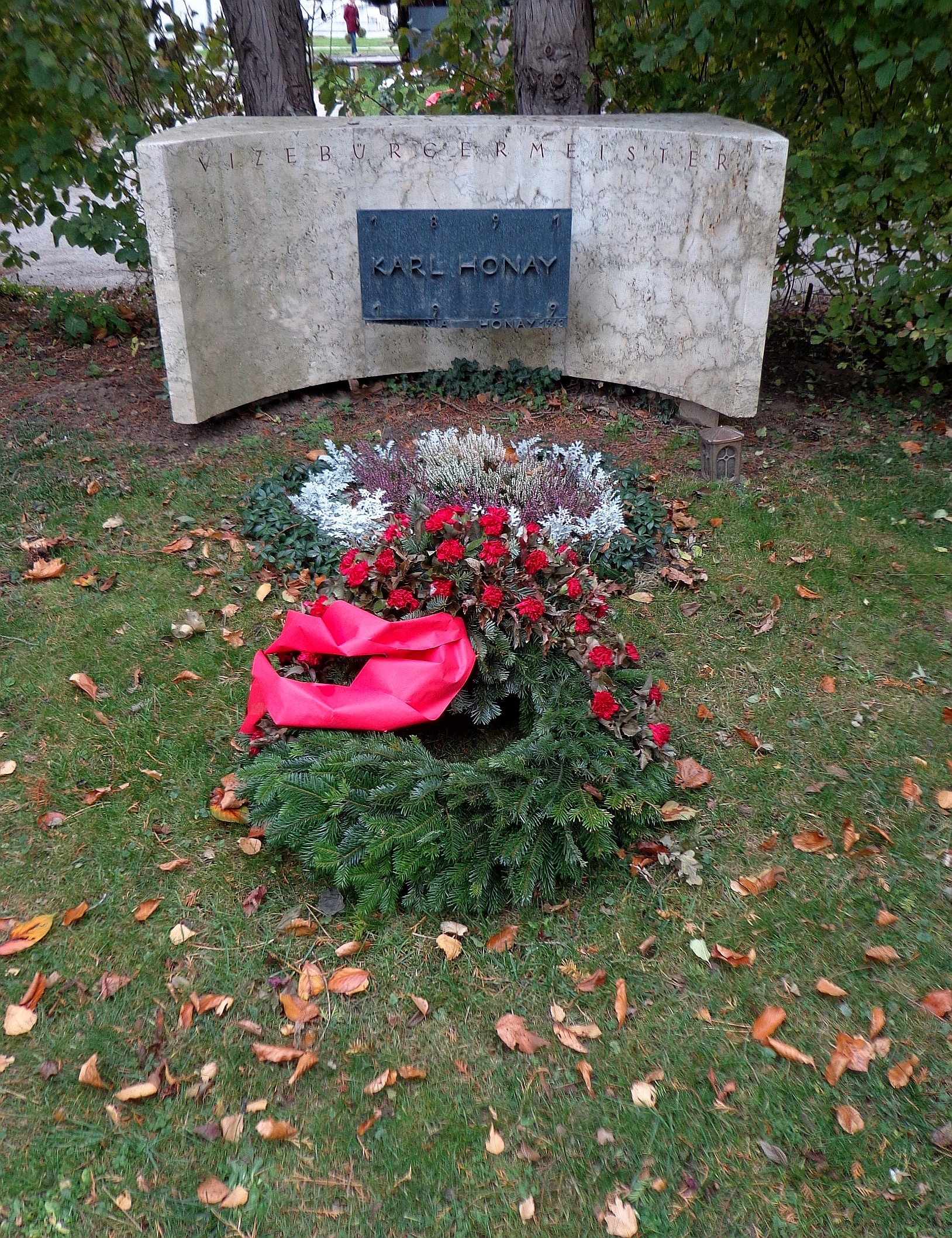 Wiener Zentralfriedhof - Gruppe 14 C, Ehrengrab von Karl Honay